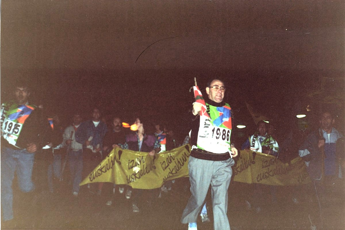 Colección AMARAUNA Bilduma 1991 Er. 334 Iturria / Fuente: Mertxe Mardaras Informazio gehiago / Más información: Amarako Ernest Lluch Kultur Etxeko Liburutegia / Biblioteca del Centro Cultural Ernest Lluch de Amara (Donostia-San Sebastián). Korrika, popular relay race in support of the Basque language across Donostia-San Sebastián